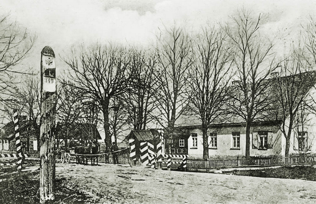 Postkarte von Bajohren, Kreis Memel, Grenzhaus bei Russisch Crotting